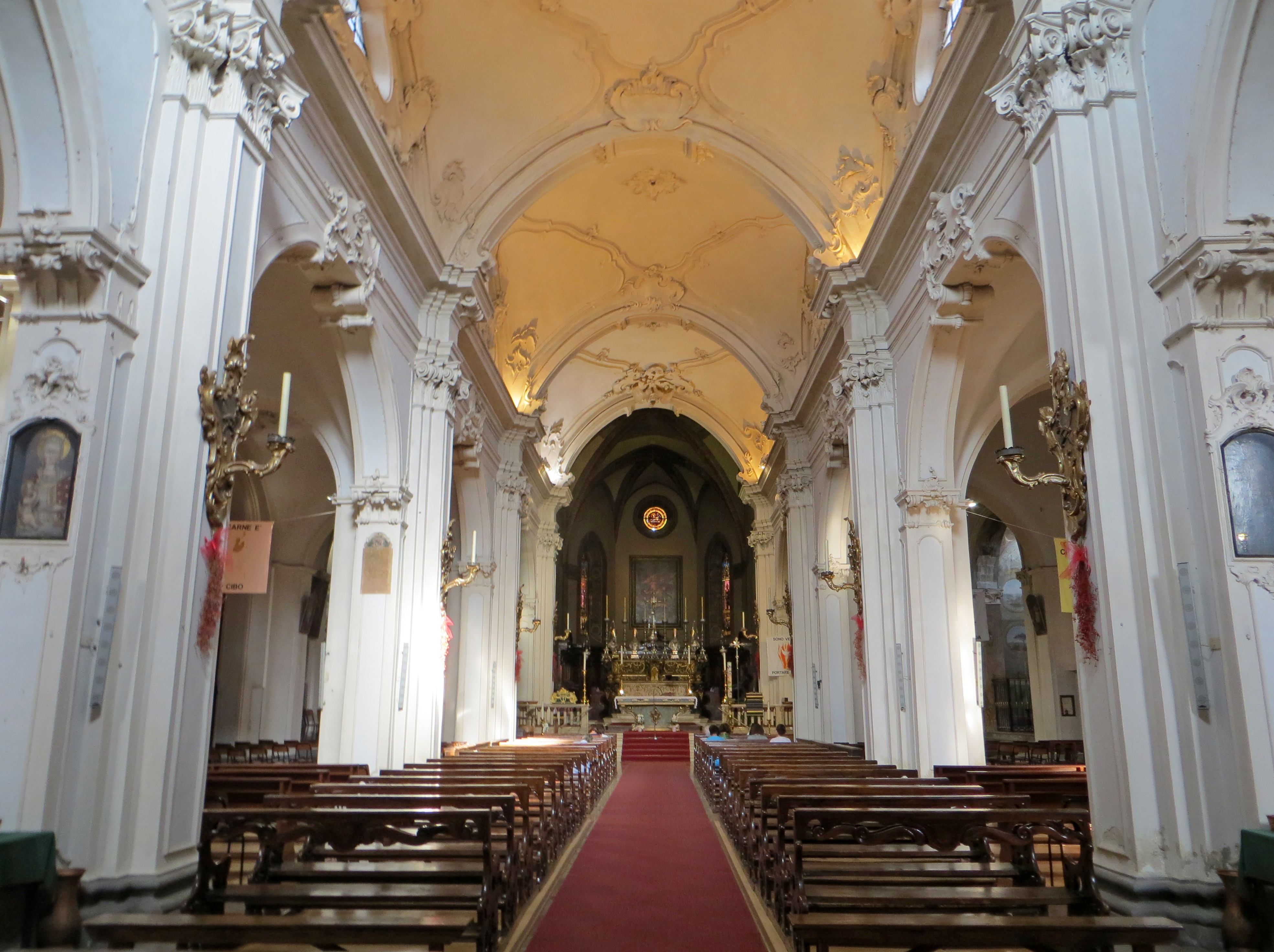 Collegiata di San Bartolomeo Apostolo (Busseto) - navata centrale